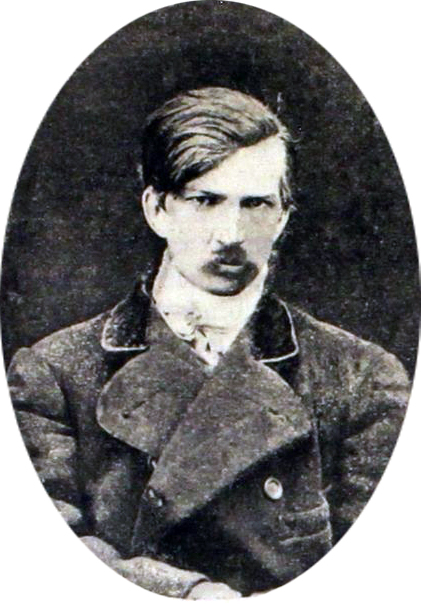 Соловьёв, Александр Константинович